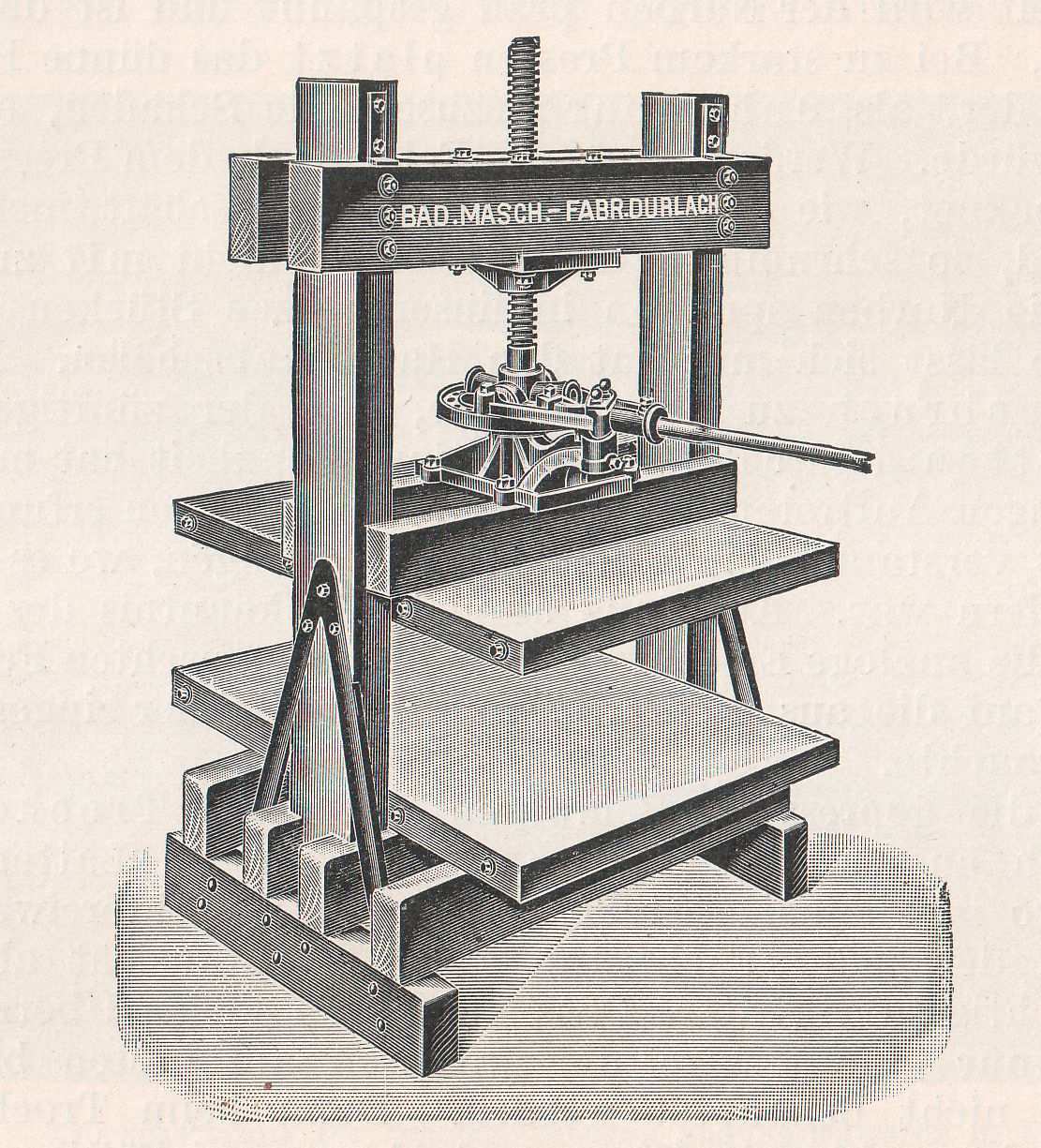 Aus H. Werner: Die Kürschnerkunst. Verlag Bernh. Friedr. Voigt, Leipzig.. Bildunterschrift: Fellpresse für Handbetrieb.